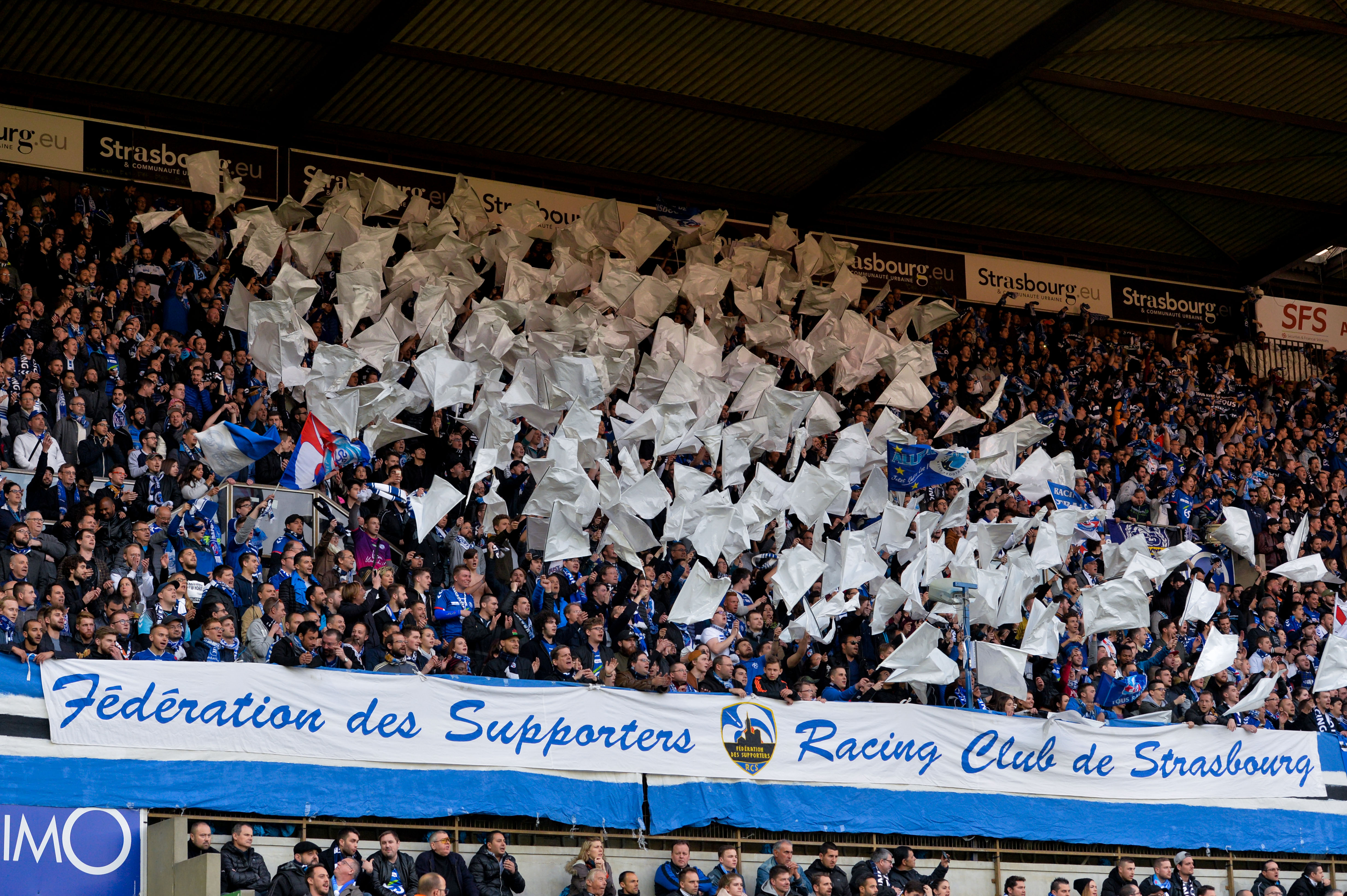 tifo et kop RCSA Racing Club de Strasbourg Alsace au stade de la Meinau. photo Franck KOBI / Haguenau port 06.81.38.09.98 FSRCS Fédaration des supporters du RCS